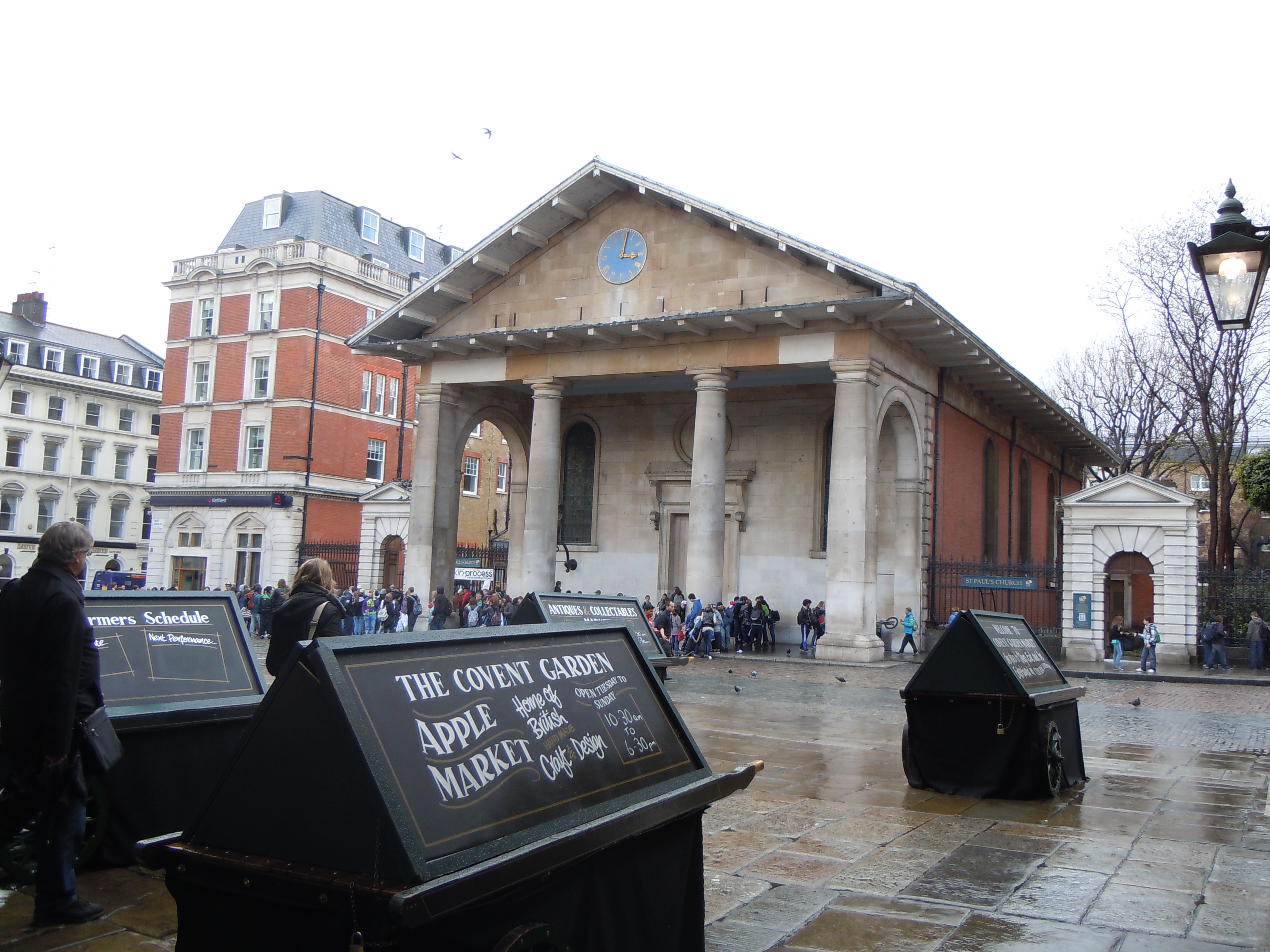 St Pauls Church, Covent Garden, Londres